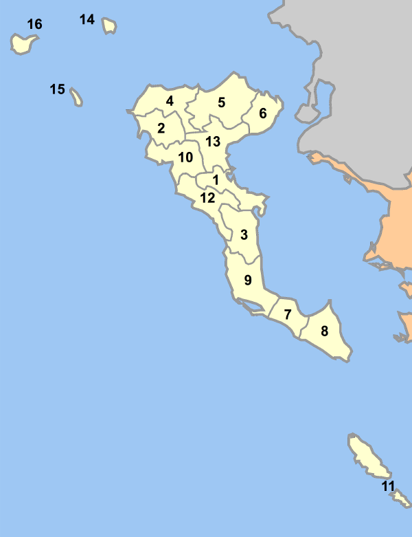 Map of Corfu prefecture (Greece) with administrative divisions (municipalities and communities) numbered in alphabetical order (in greek). Legend: 1 Δήμος Κερκυραίων - Korfu 2 Δήμος Αγίου Γεωργίου - Agios Georgios 3 Δήμος Αχιλλείων - Achillio 4 Δήμος Εσπερίων - Esperies 5 Δήμος Θιναλίου - Thinali 6 Δήμος Κασσωπαίων - Kassiopi 7 Δήμος Κορισσίων - Korissia 8 Δήμος Λευκιμμαίων - Lefkimmi 9 Δήμος Μελιτειέων - Melitia 10 Δήμος Παλαιοκαστριτών - Paleokastritsa 11 Δήμος Παξών - Paxi 12 Δήμος Παρελίων - Parelii 13 Δήμος Φαιάκων - Feakes 14 Κοινότητα Ερεικούσσας - Erikoussa 15 Κοινότητα Μαθρακίου - Mathraki 16 Κοινότητα Οθωνών - Othoni